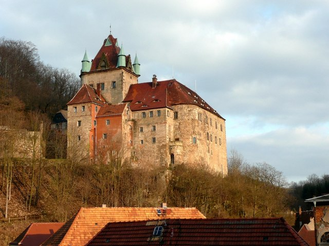 Schloss Kuckuckstein in Liebstadt (Kuckuckstein castle in Liebstadt)